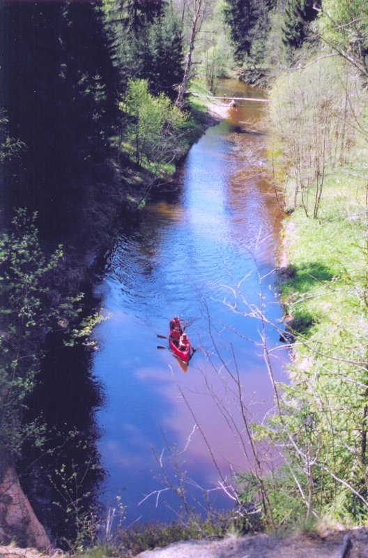 Kanuumatkajad Ahja jõel. 2005.a.